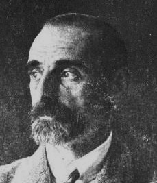 Francesc Cambó, político español conservador catalanista.